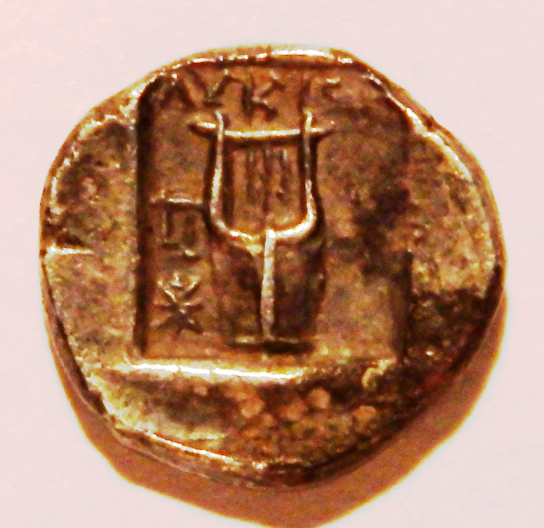 Drachme aus Patara, Lyra, ca. 167-110 v. Chr. geprägt, Szaivert/Sear 5361